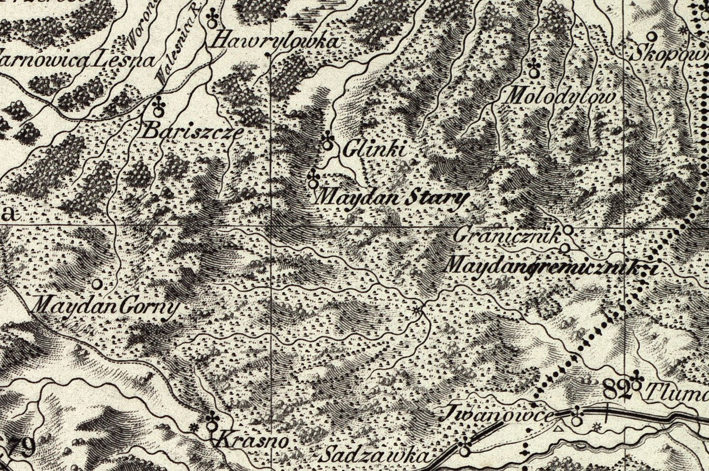 Фрагмент австрійської карти 1824 року, с. Середній Майдан